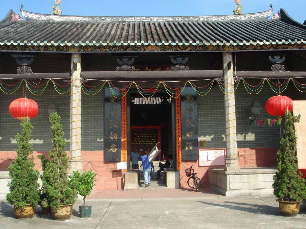 中文（香港）: 鄧氏宗祠。